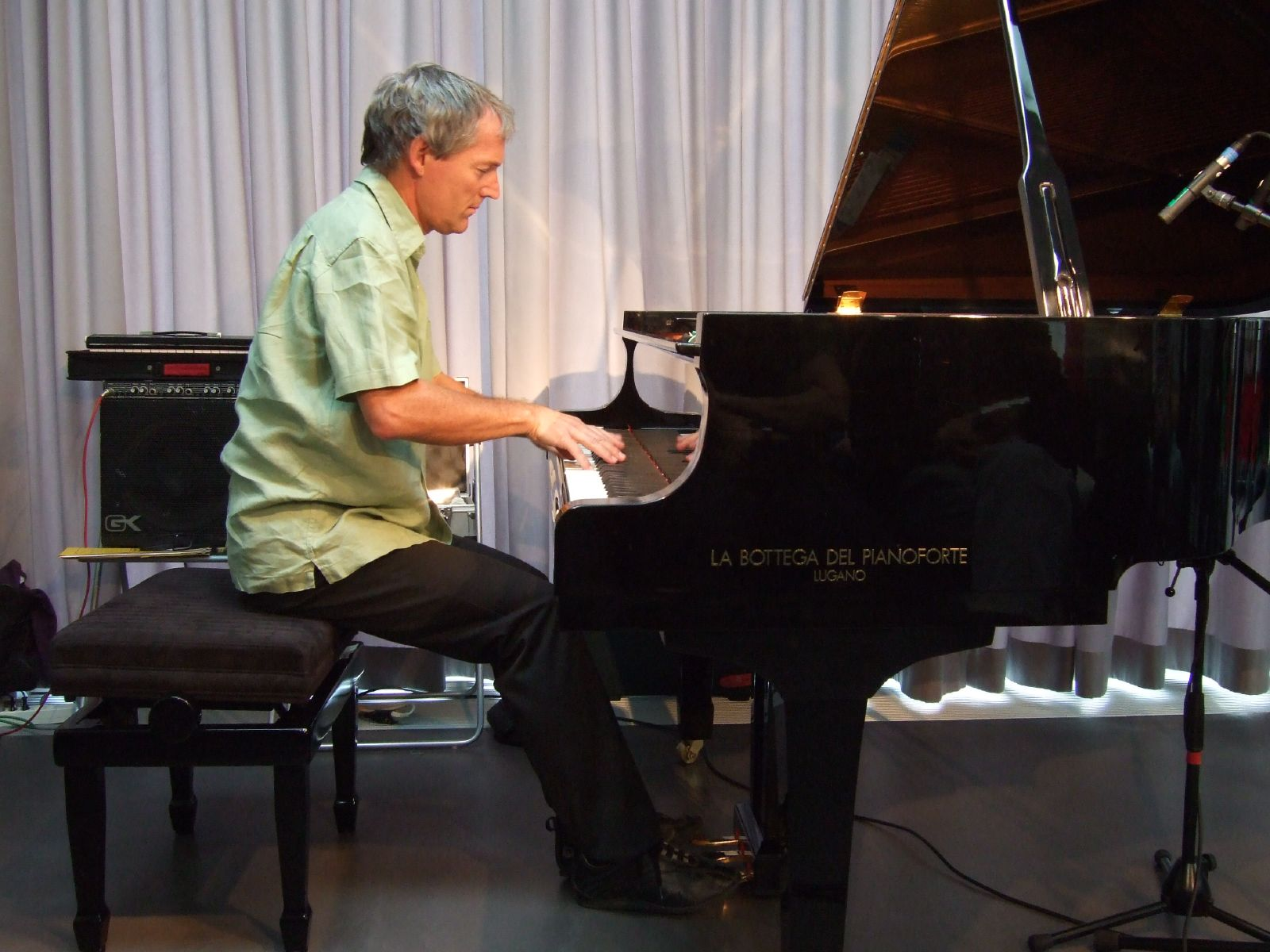 Pianist John Wolf Brennan (* 1954) beim Jazz Festival Willisau 2007